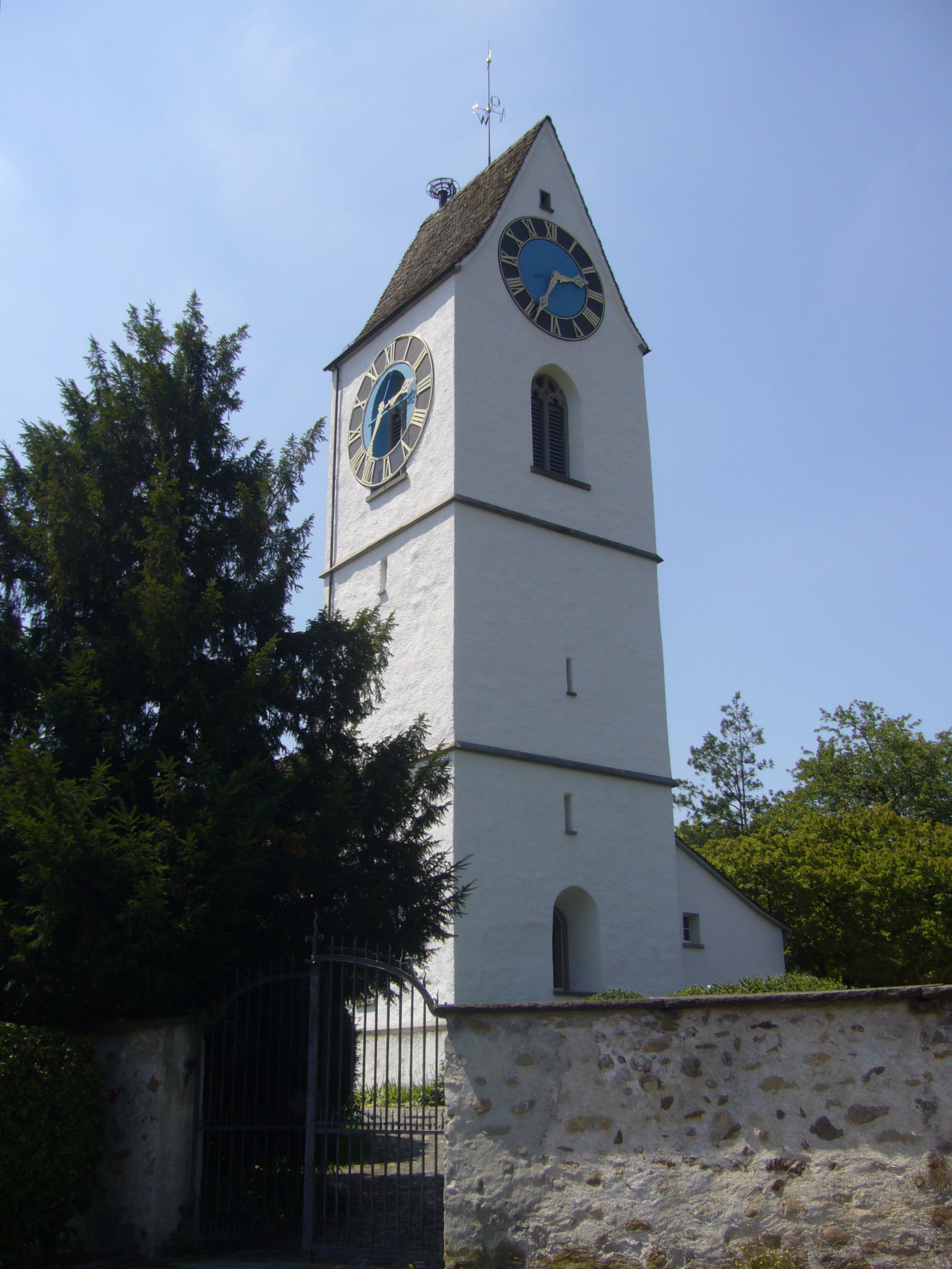 Turm der reformirten Kirche zu Bassersdorf.